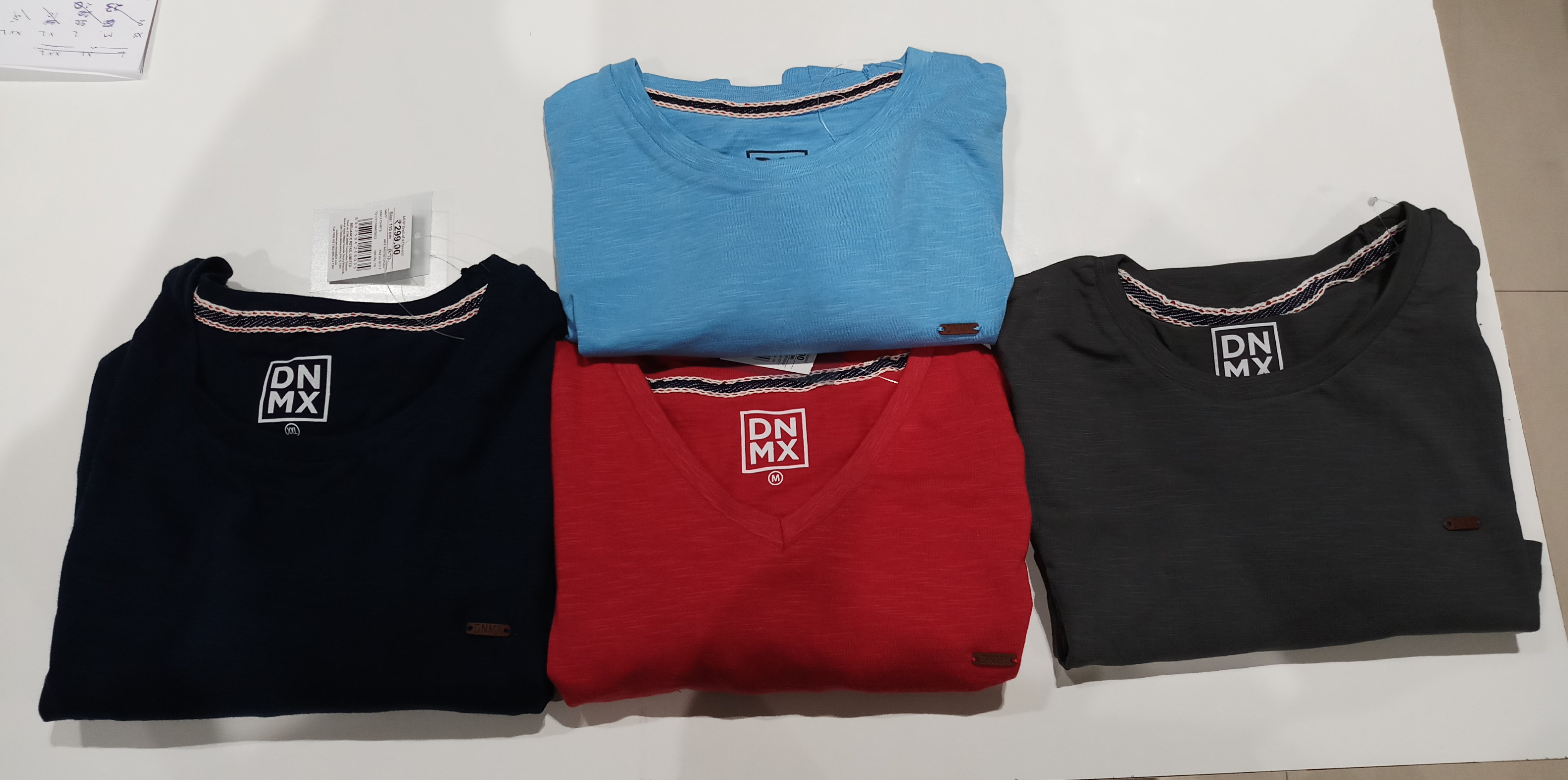 T-shirt size S,M,L,XL,XXL